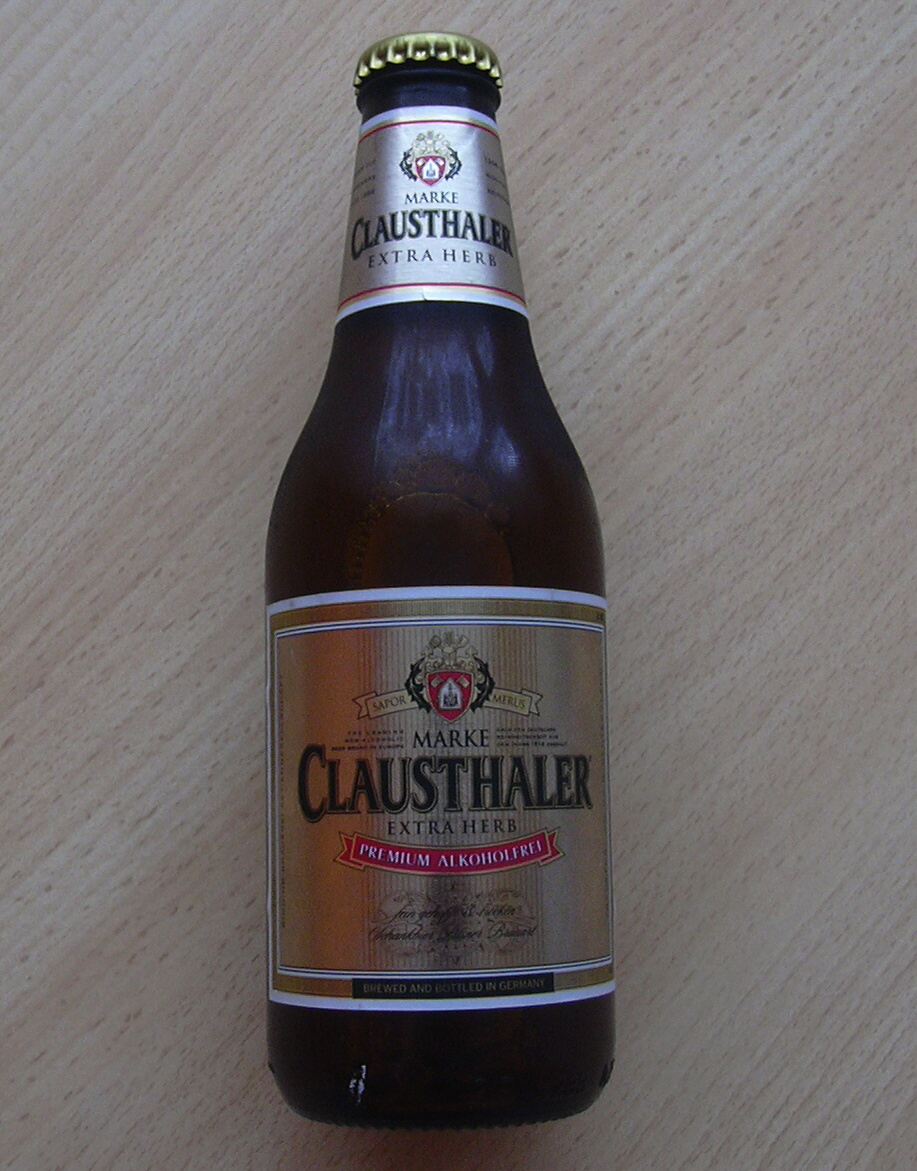 Clausthaler (Beer- germany)